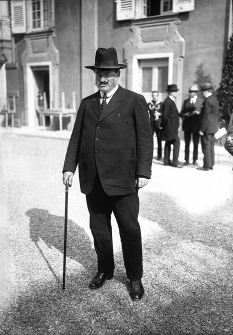 El primer ministro búlgaro, Alejandro Stamboliski, en la Conferencia de Génova en 1922.